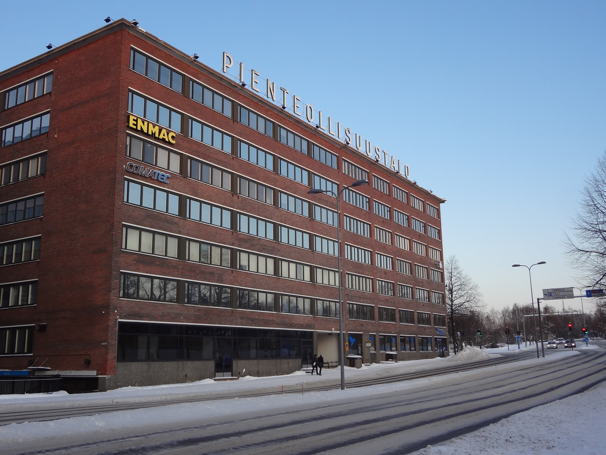 PT-talo